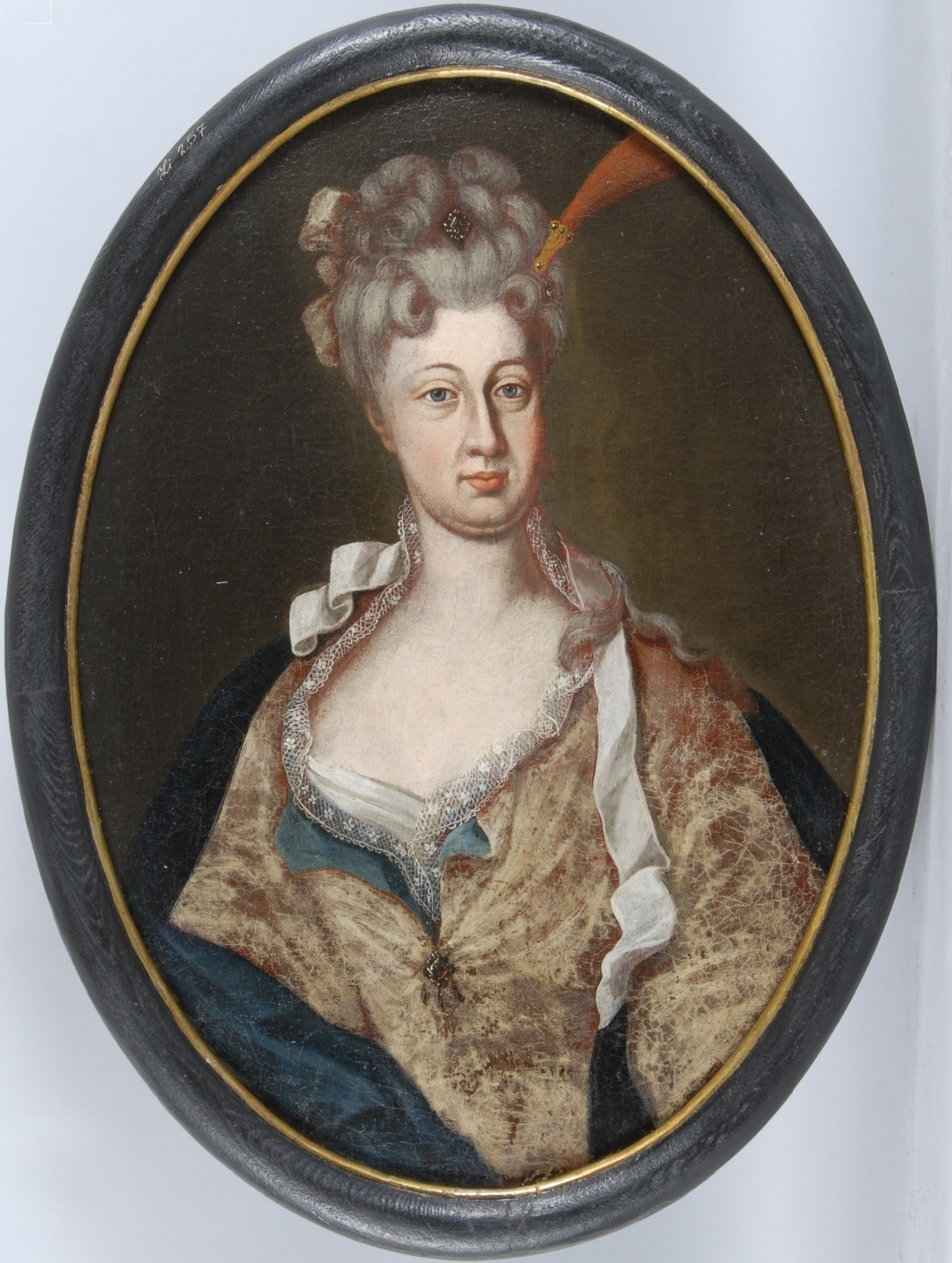 Marie Anna Terezie Krakowská z Kolowrat, rozená von Stein zu Jettingen (manželka Maximiliana Norberta Krakowského z Kolowrat)